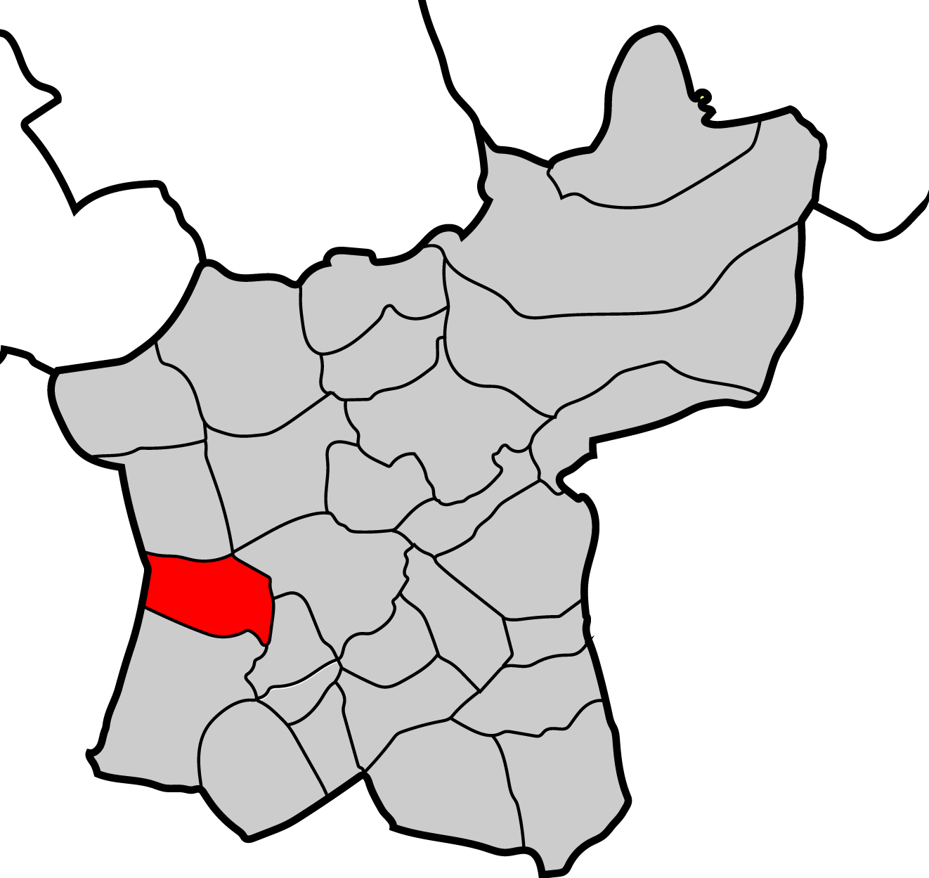 Mapa parroquia de Lebruxo Baralla